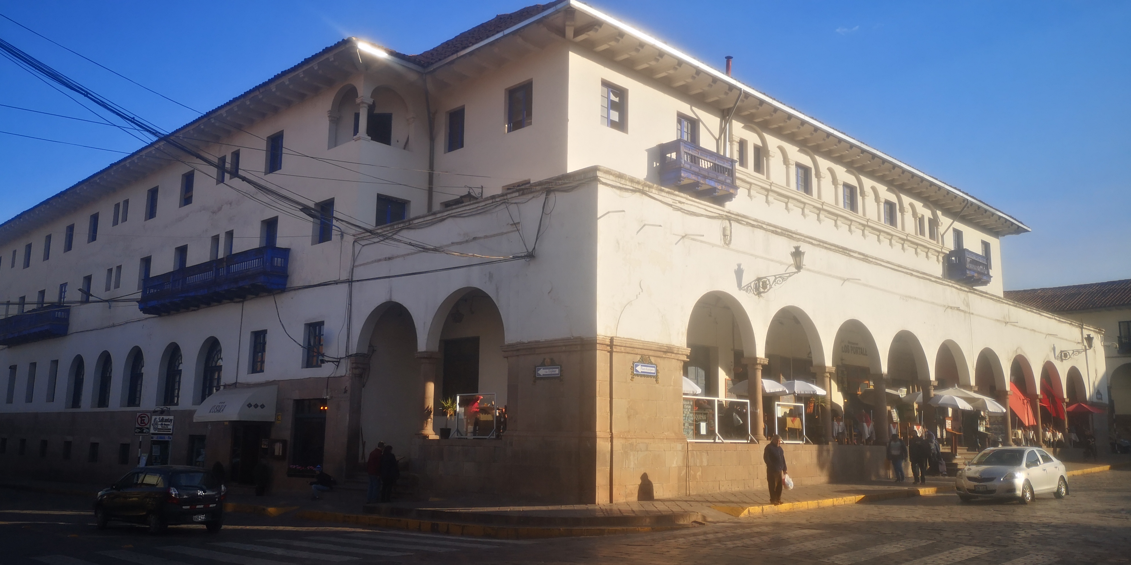 Vista del Hotel Cusco desde el Portal Espinar en la Plaza Regocijo.